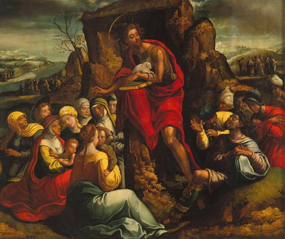 Luís Reis Santos aproximou esta pintura da obra de Gregório Lopes, propondo uma datação que medeia entre 1530 e 1540. Só recentemente se atribuíu o quadro a Diogo Contreiras, pintor com actividade documentada entre 1521 e 1560. Trata-se de uma pintura acabada em 1554 para um retábulo do convento das freiras cistercienses de Évora. Segundo Vítor Serrão, estamos perante um dos primeiros exemplos da adopção do maneirismo italianizante na arte portuguesa. * Forma de Protecção: classificação; Nível de classificação: interesse nacional; Motivo: Necessidade de acautelamento de especiais medidas sobre o património cultural móvel de particular relevância para a Nação, designadamente os bens ou conjuntos de bens sobre os quais devam recair severas restrições de circulação no território nacional e internacional, nos termos da lei n.º 107/2001, de 8 Setembro e da respectiva legislação de desenvolvimento, devido ao facto da sua exemplaridade única, raridade, valor testemunhal de cultura ou civilização, relevância patrimonial e qualidade artística no contexto de uma época e estado de conservação que torne imprescindível a sua permanência em condições ambientais e de segurança específicas e adequadas; Legislação aplicável: Lei n.º 107/2001, de 8 de Setembro; Acto Legislativo: Decreto; N.º 19/2006; 18/07/2006 *